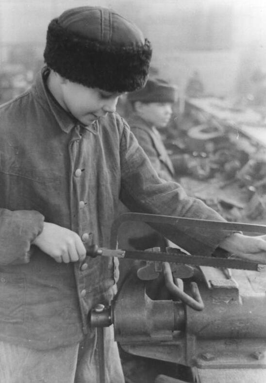 Berlin, 14-jähriger Ukrainer Zwangsarbeiter ADN-Zentralbild-Archiv II. Weltkrieg 1939-45 Zwangsarbeiter aus der Sowjetunion müssen für die faschistische deutsche Rüstung arbeiten. UBz.: Ein 14-jähriger Jugendlicher aus der Ukraine muss in einem Berliner Kraftfahr-Instandsetzungswerk der deutschen Wehrmacht beschädigte und unbrauchbar gewordene Kraftwagen wieder instandsetzen. Januar 1945. Aufnahme: Pips Plenik [Scherl Bilderdienst]